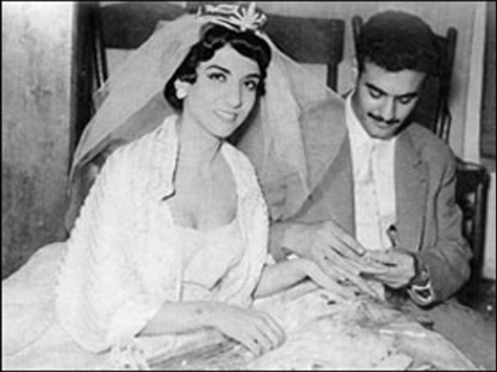 بیژن و مهین جزنی در شب عروسی